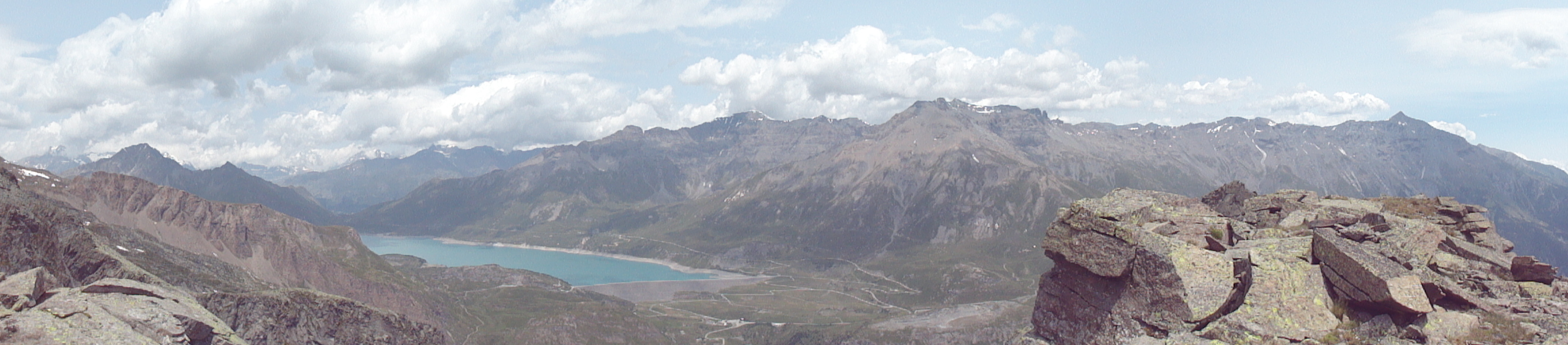 L’altipiano del Moncenisio con il suo lago visto dalla cresta del Monte Giusalet (3312m) sopra il Rifugio Piero Vacca (2675) nell’estate del 2015. Sono visibili (da sinistra verso destra) la Punta Clairy (3162m), il Passo de la Beccia (2717m) e la Cima du Laro (2881m) parte delle Alpi Cozie, il Colle del Moncenisio (2081m), che divide le Alpi Cozie dalle Graie (dietro questo, sotto le nuvole, il Massiccio della Vanoise che sovrasta la Moriana), Ouillon des Arcellins (2665m), Sommet de la Nunda(3025m), Col du Lou (3024m), Signal du Grand Mont Cenis(3377m), Punta Roncia(3612m), Pointe du Vieux (3464m), Pointe de la Haie (3452m), Punta Lamet(3504m), Roche Michel (3429), I Tre Denti(3281-3285m), Punta Marmottere(3387m), Passo della Novalesa, Rocciamelone (3537m) parte delle Alpi Graie. Sotto la Punta Lamet si scorge il luogo dove sorgeva la Batteria Paradiso e dove sono ancora presenti i ruderi della Batteria La Court. Si nota anche la Strada statale 25 del Moncenisio